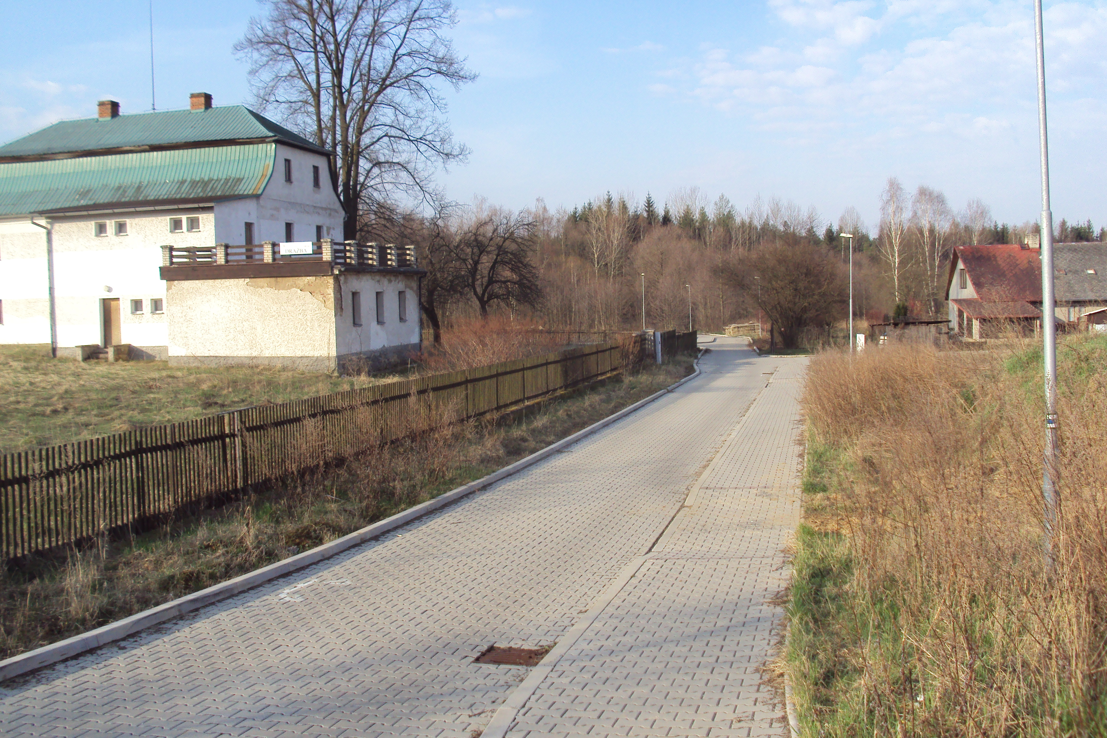 Domky v Maxově u Radvance